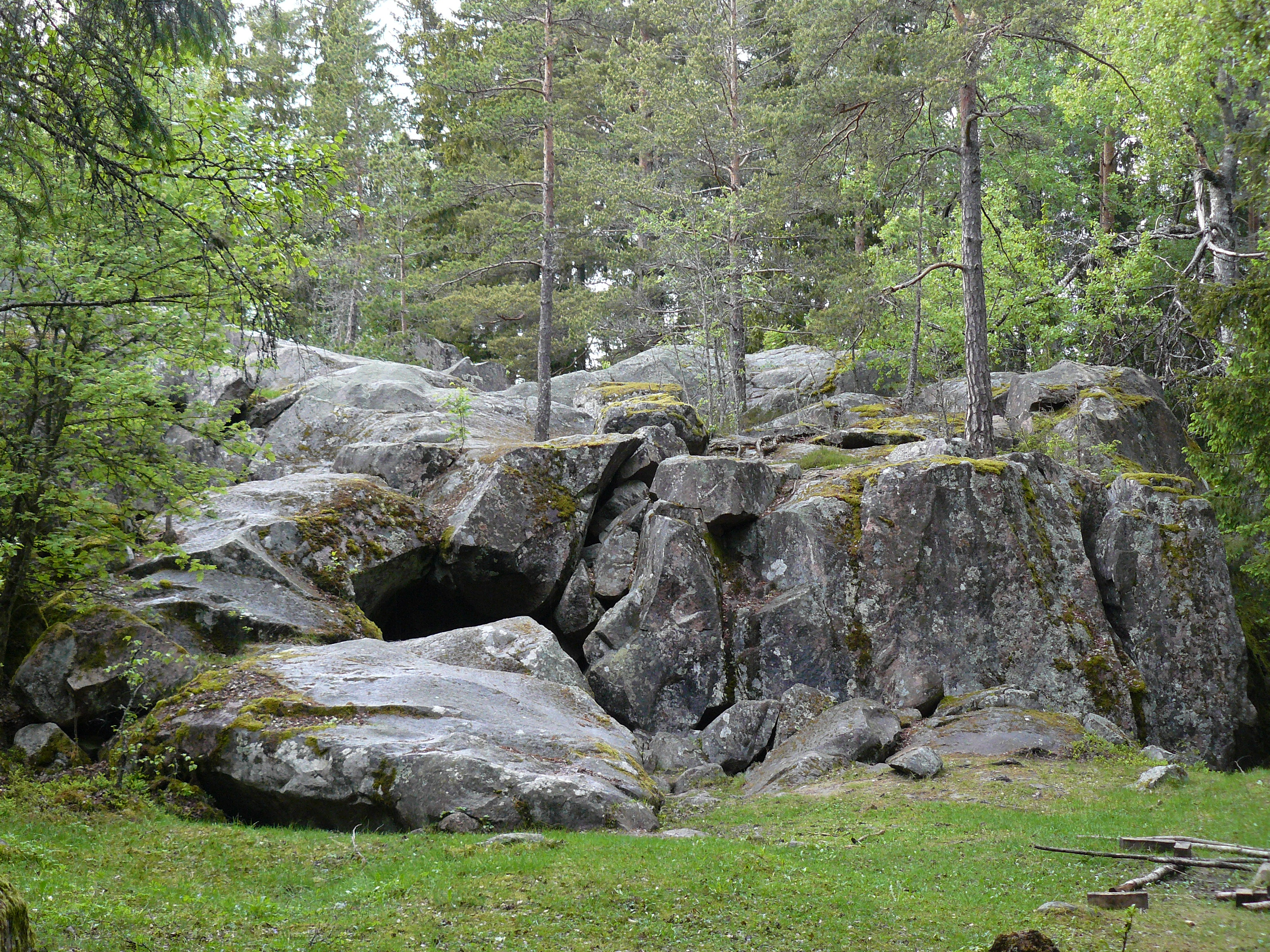 "Torekulla kyrka" är en rasgrotta utanför Finspång, Östergötland, Sverige.